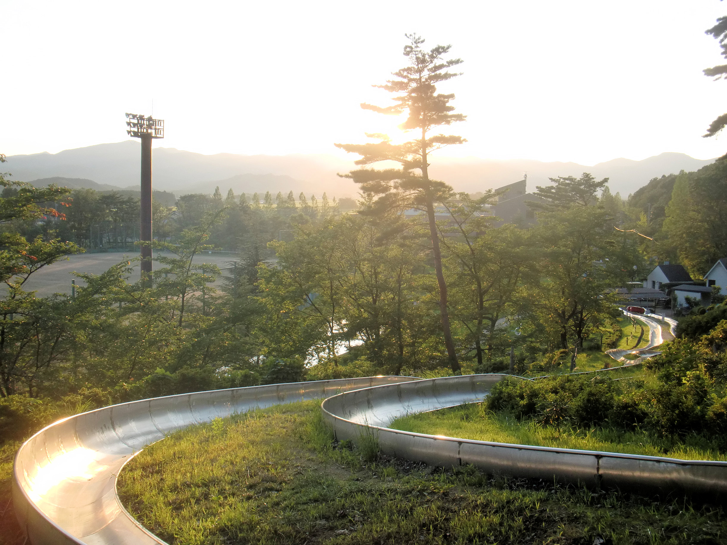 郡山市大槻町 大槻公園 スーパースライダーのコース付近から見下ろす麓のスポーツ施設等